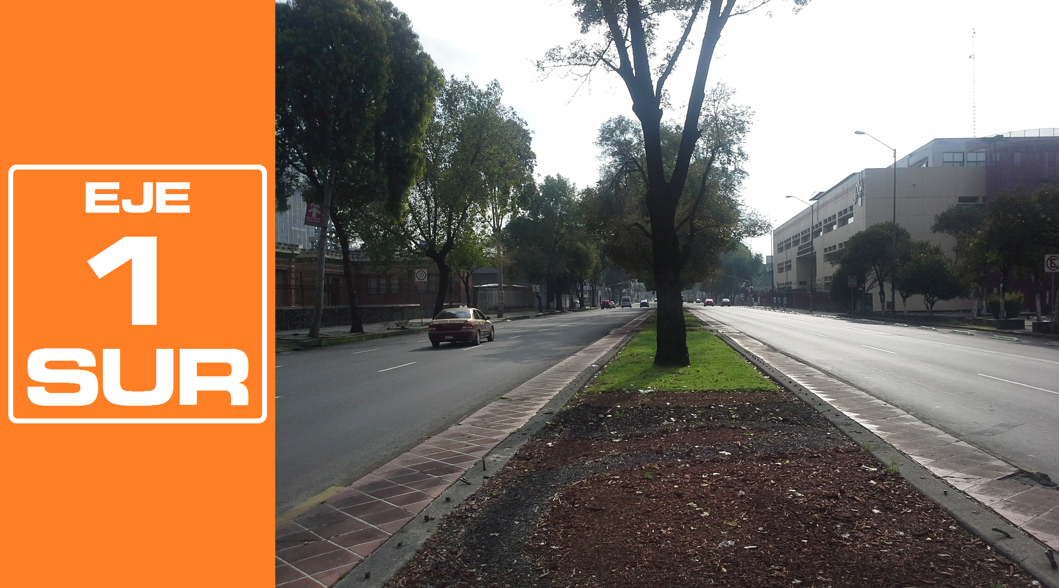 Rediseñado original de la señalética de los Ejes viales de la Ciudad de México por José García (Wiki ID: narumiyama)